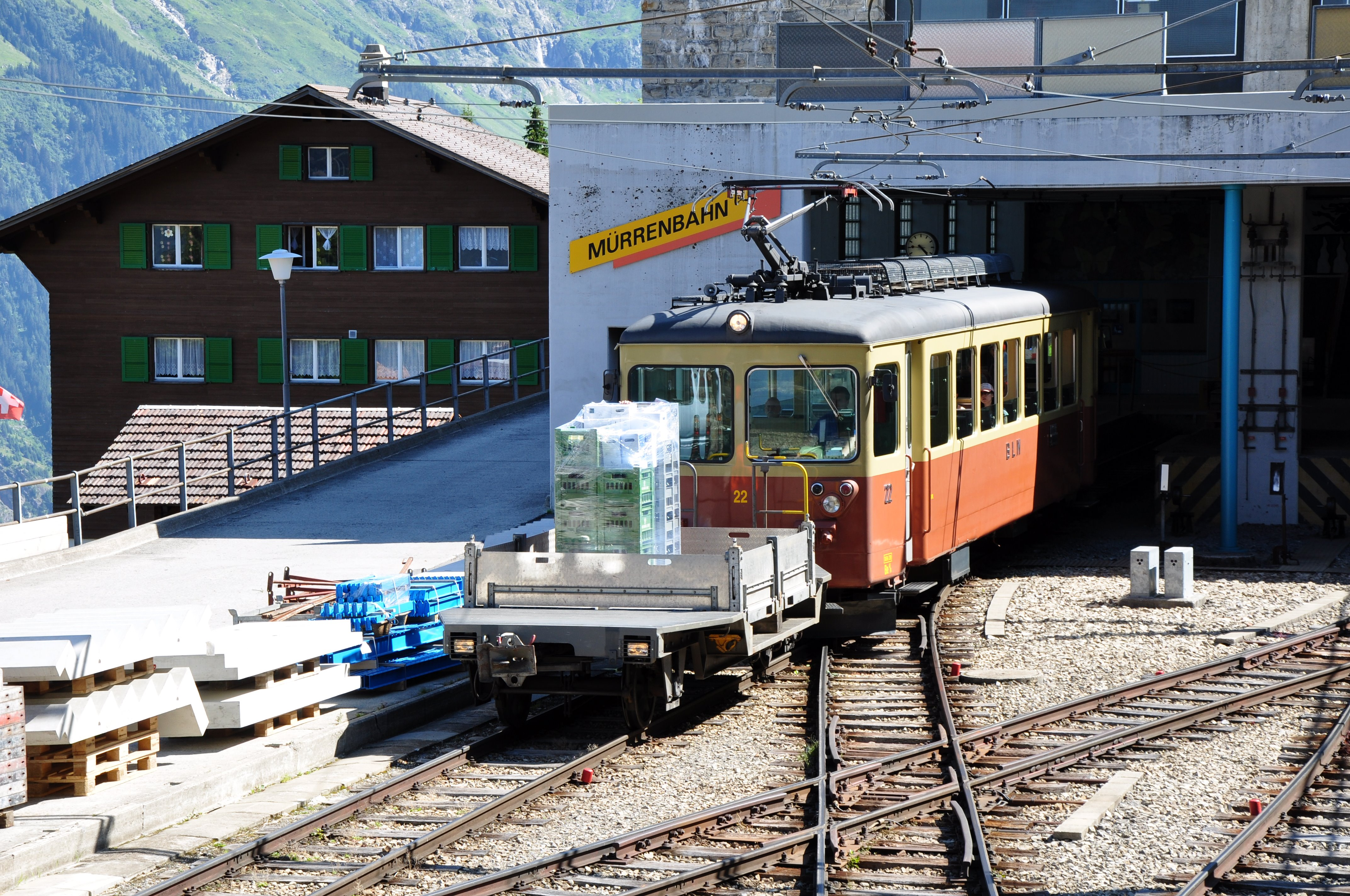 Switzerland, Canton of Bern, Mürrenbahn